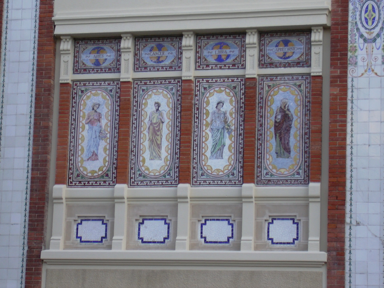 Casa Solans. Zaragoza